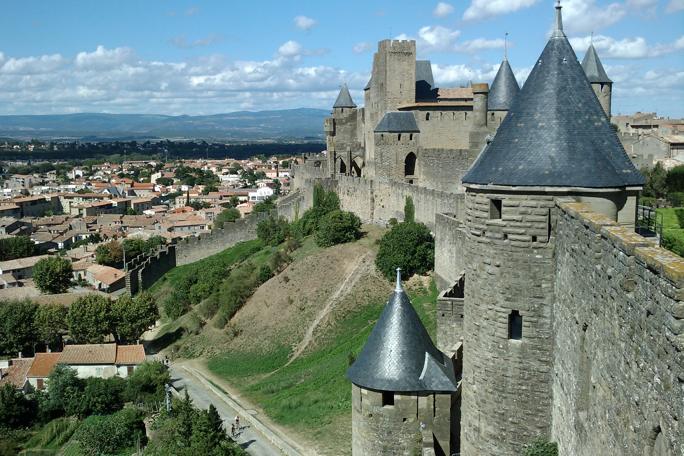 Remparts de la cité de Carcassone .